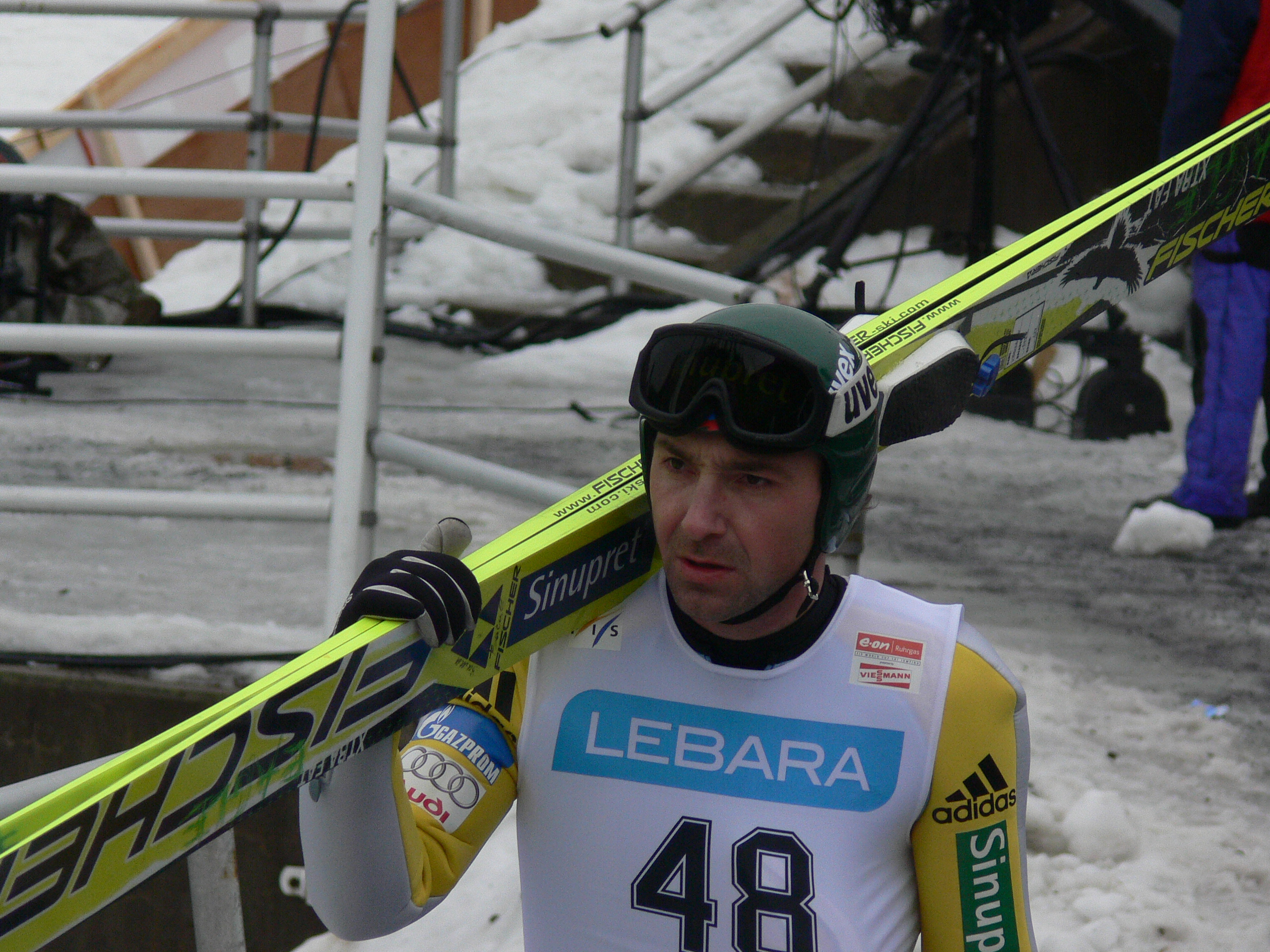 Dimitry Vassiliev, from the 2008 World Cup ski jumping event in Holmenkollen, Oslo.